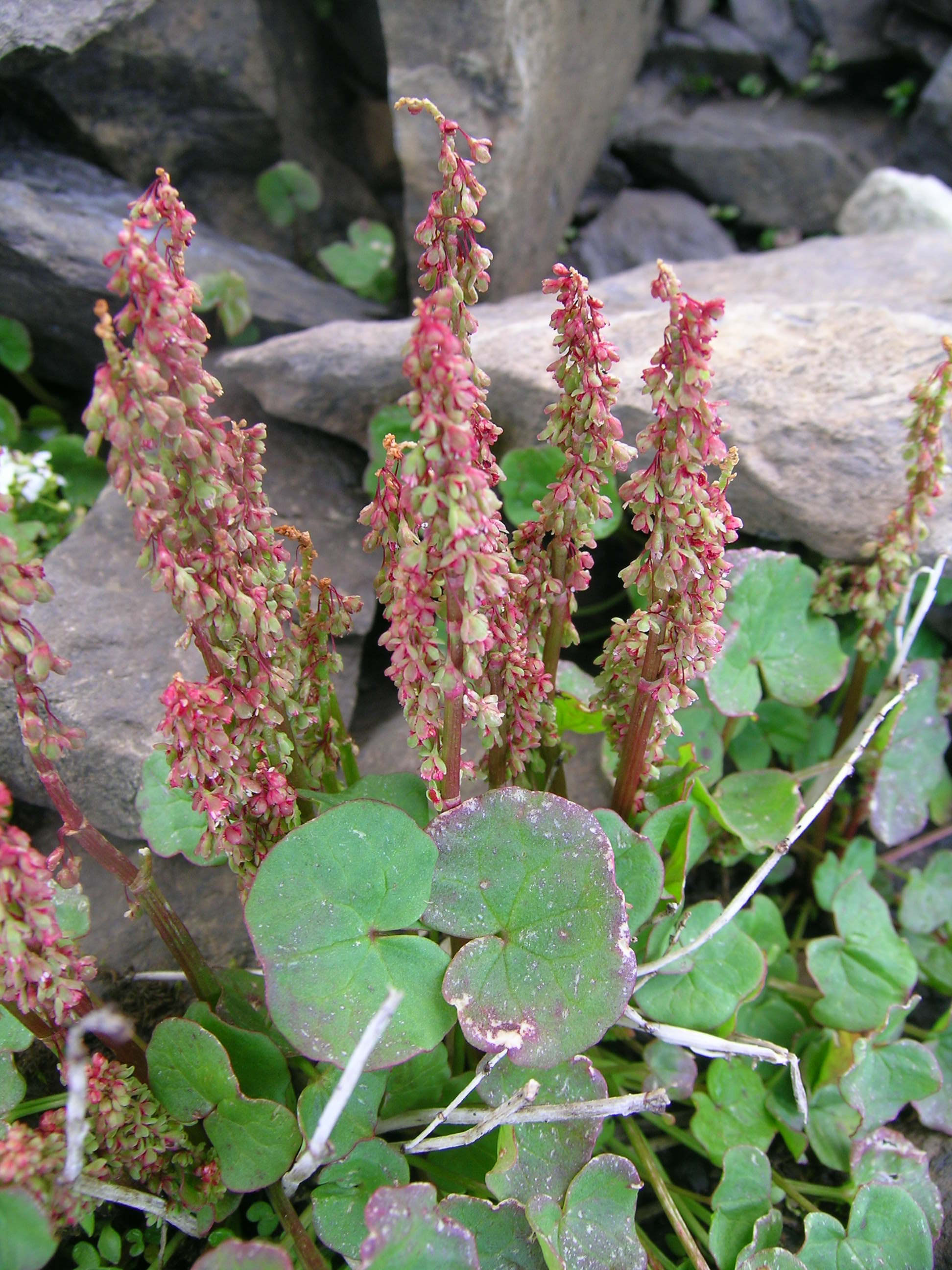 Alpen-Säuerling (Oxyria digyna), Schynige Platte, Kanton Bern, Schweiz